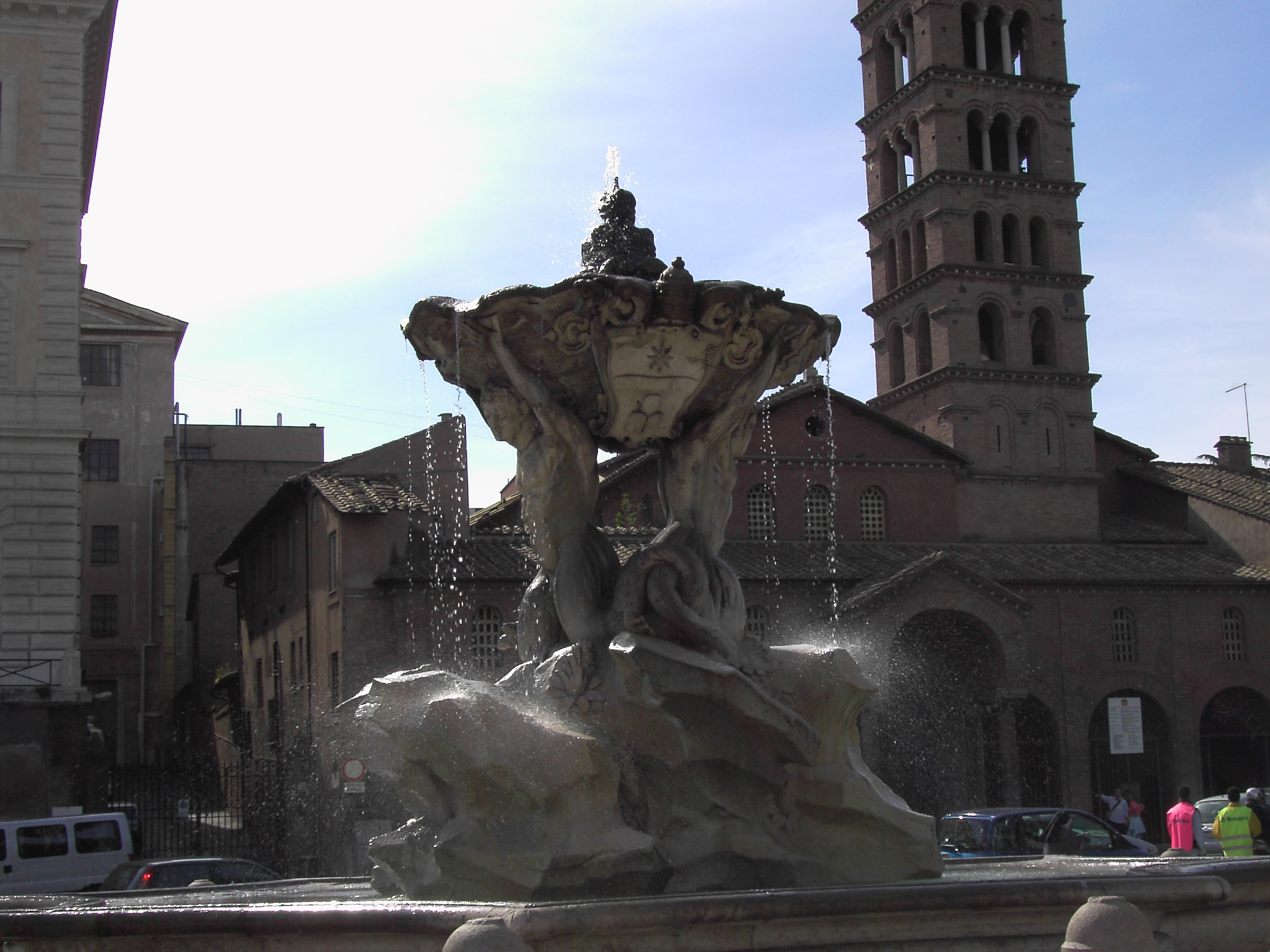 Roma, fontana dei tritoni alla Bocca della Verità